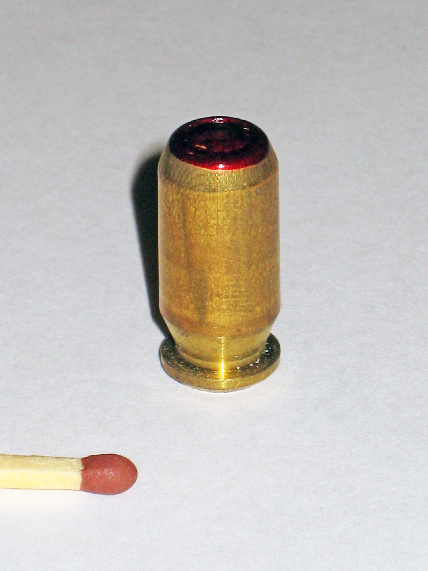 Zündpatrone für Flw, ALN 591-4610